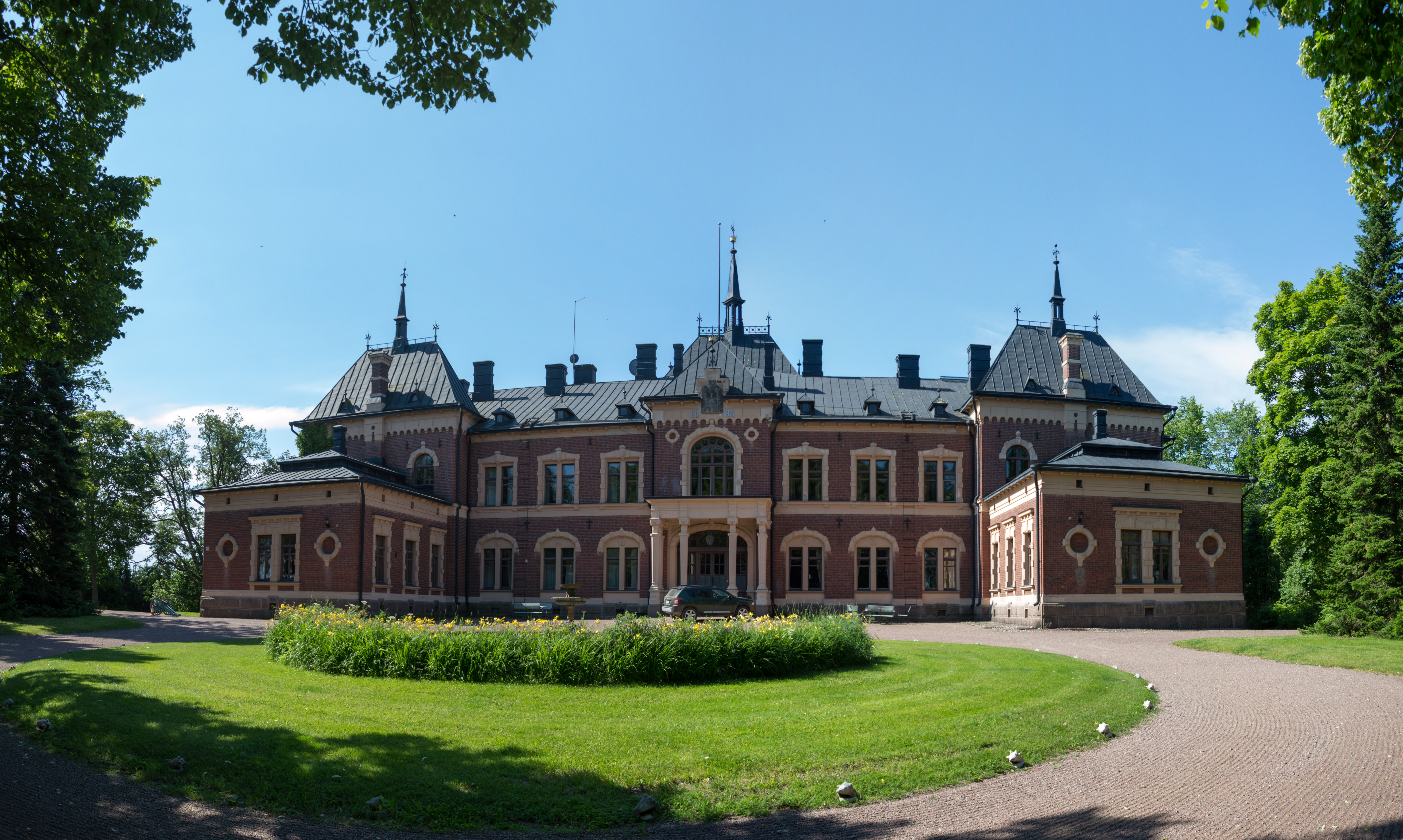 Malmgårdin kartano Pernajan kunnassa